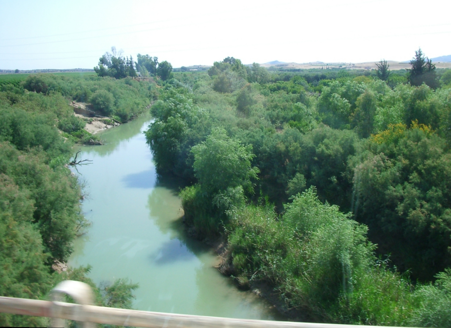 riu Medjerda